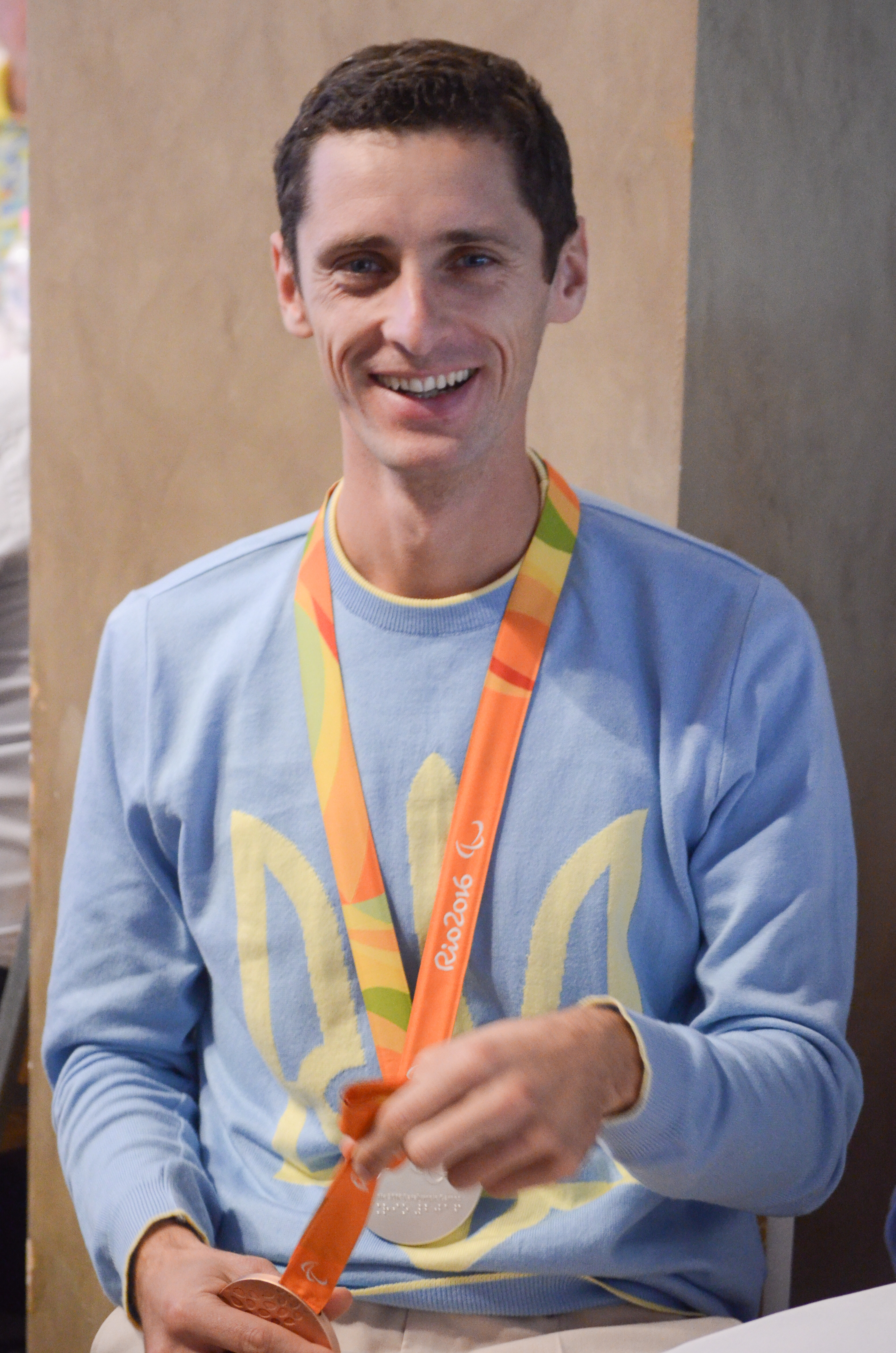 Зустріч Президента України з олімпійцями та паралімпійцями — учасниками Ріо-2016.